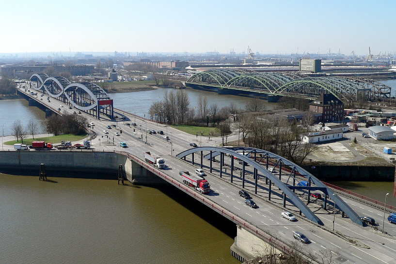 Neue und Freihafen-Elbbrücke, Hamburg